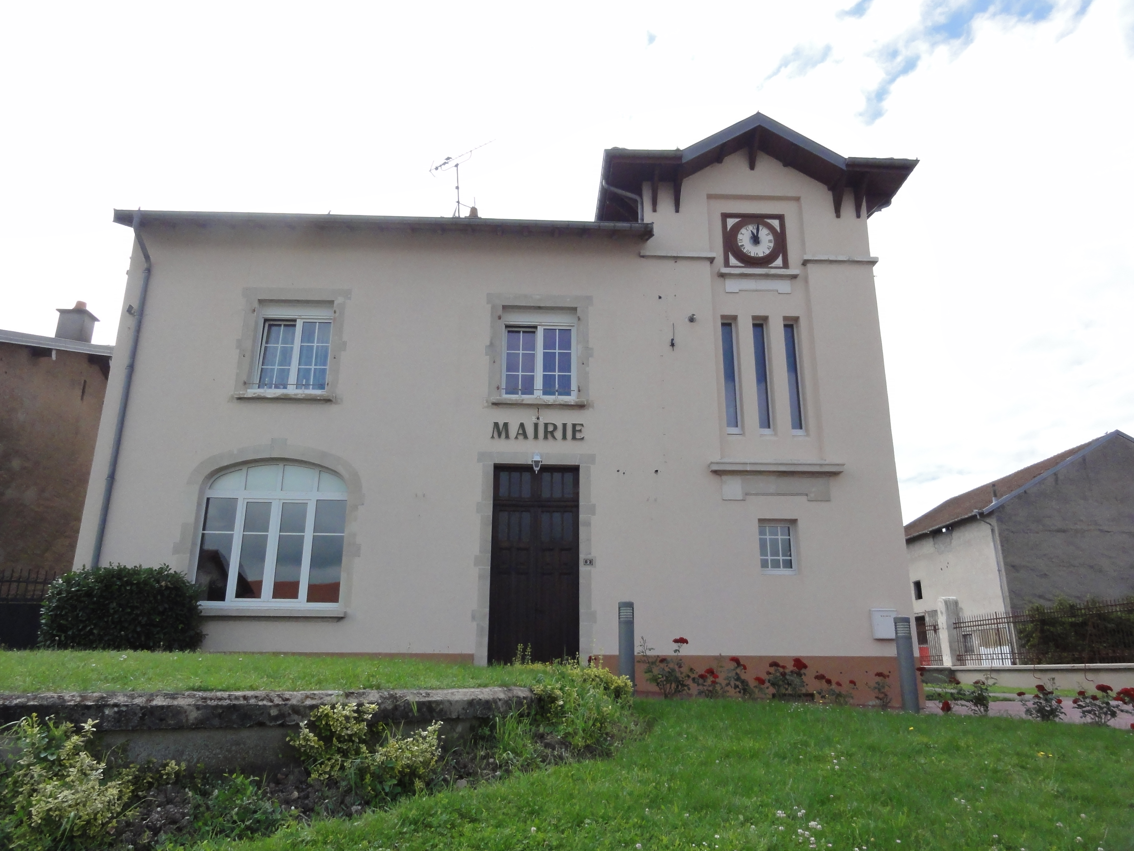 Vého (M-et-M) mairie